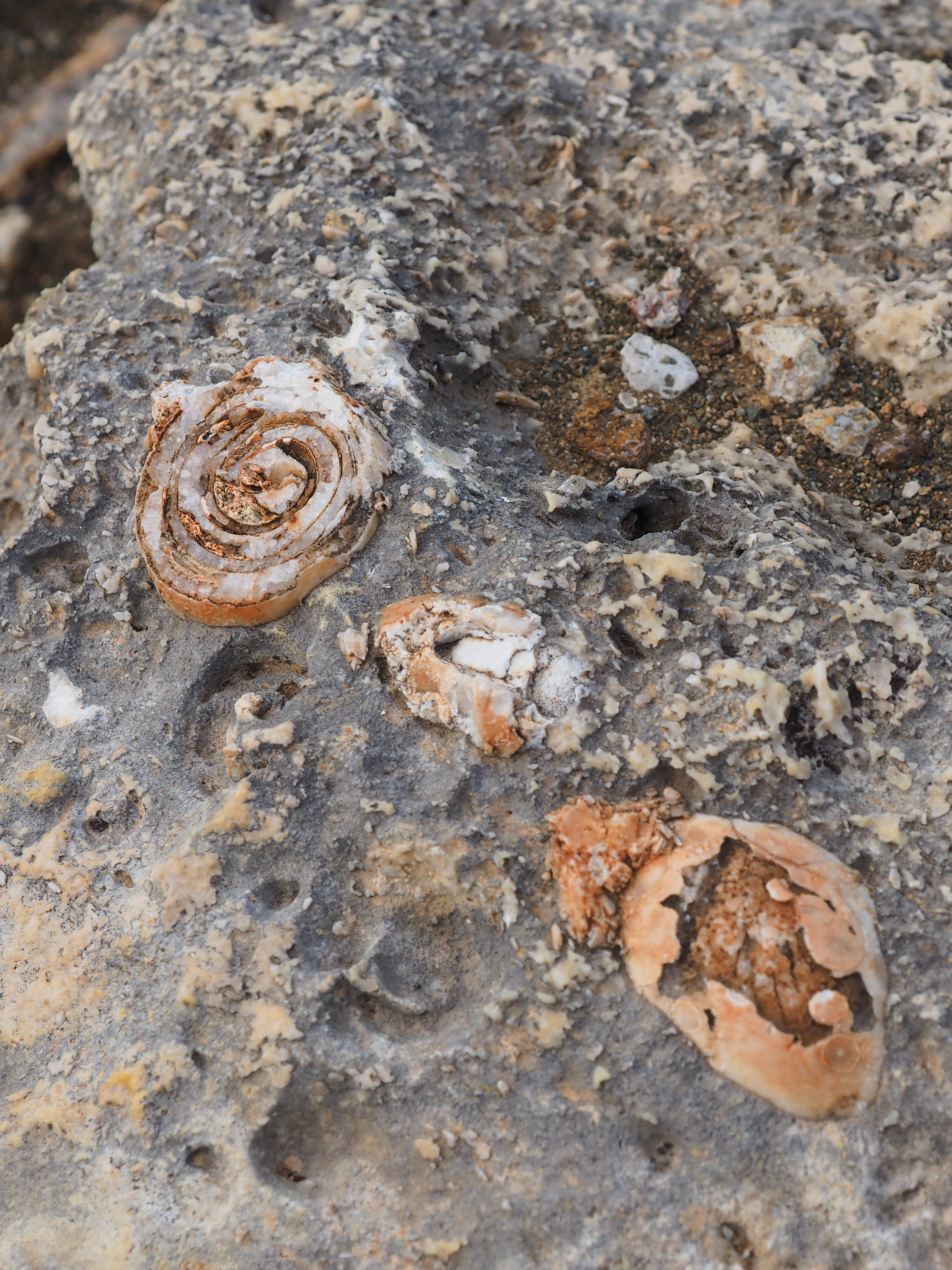 פארק הכרמל הוא כינוי לרצף של גנים לאומיים ושמורות טבע על הר הכרמל הגבוה, המשתרע מגבולותיהן הדרומיים של הערים חיפה ונשר בצפון, ועד אזור נחל מערות ועמק מהר"ל בדרום; שלושה יישובים על רכס הכרמל מהווים מובלעות בתוך רצף שטחי הפארק - עספיא, דלית אל כרמל ובית אורן. גודל הפארק המקורי היה 101,590 דונם, מתוכם 63,950 דונם שהוגדרו כ-"גן לאומי" ו-37,640 דונם הוגדרו כ"שמורת טבע". שטח השמורות משולב בתוך פארק הכרמל כאשר שטחי הגן הלאומי מקיפים את השמורות ויוצרים רצף של שטחים ירוקים.